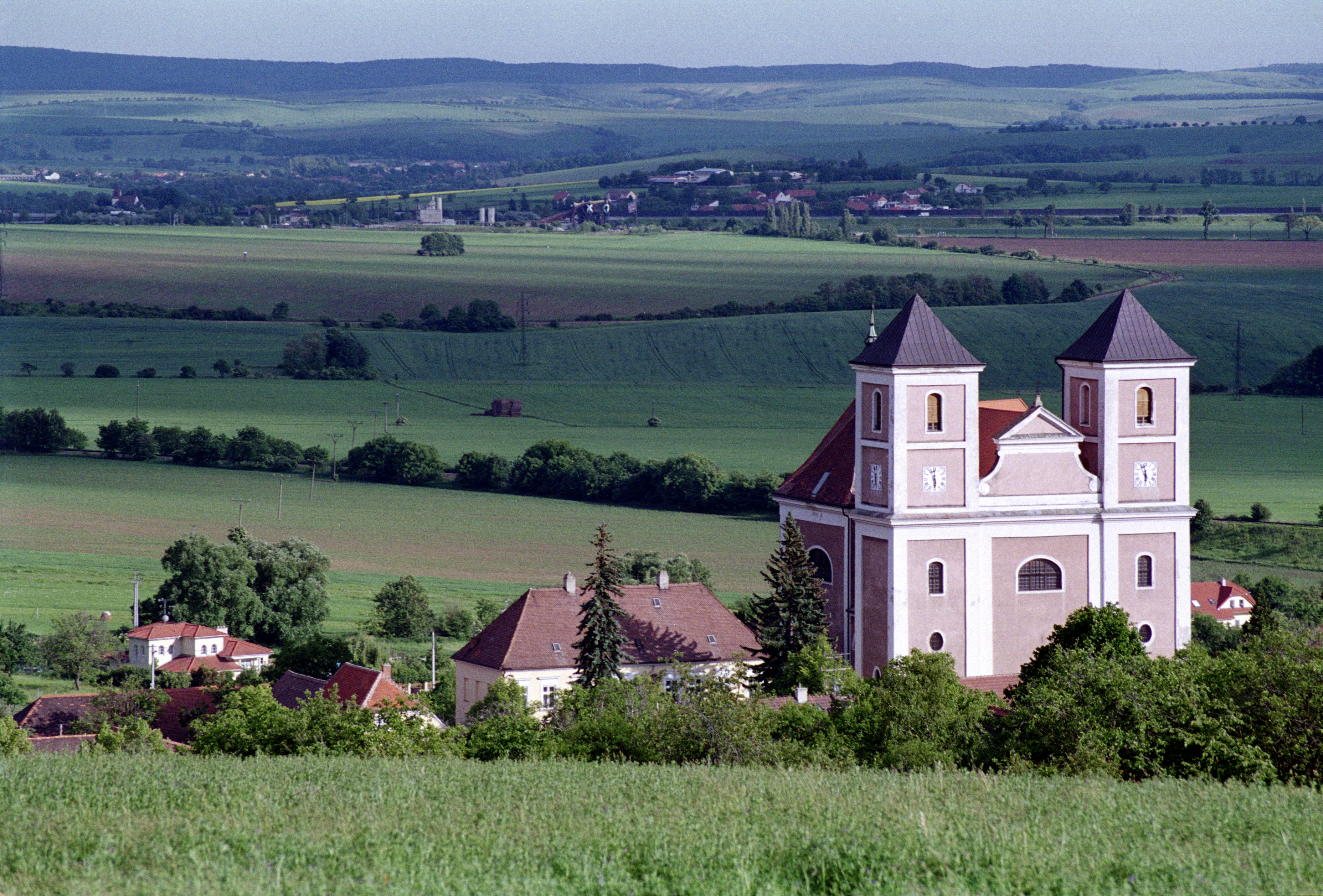 Kostel Nanebevzetí P. Marie, s omezením: bez náhrobků r. č. 7-903, 7-904, 7-905 (Pozořice), Na Městečku, Pozořice